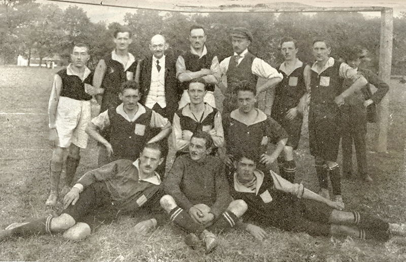 Deze afbeelding is meer dan 100 jaar oud en er staan geen auteursrechten meer op.